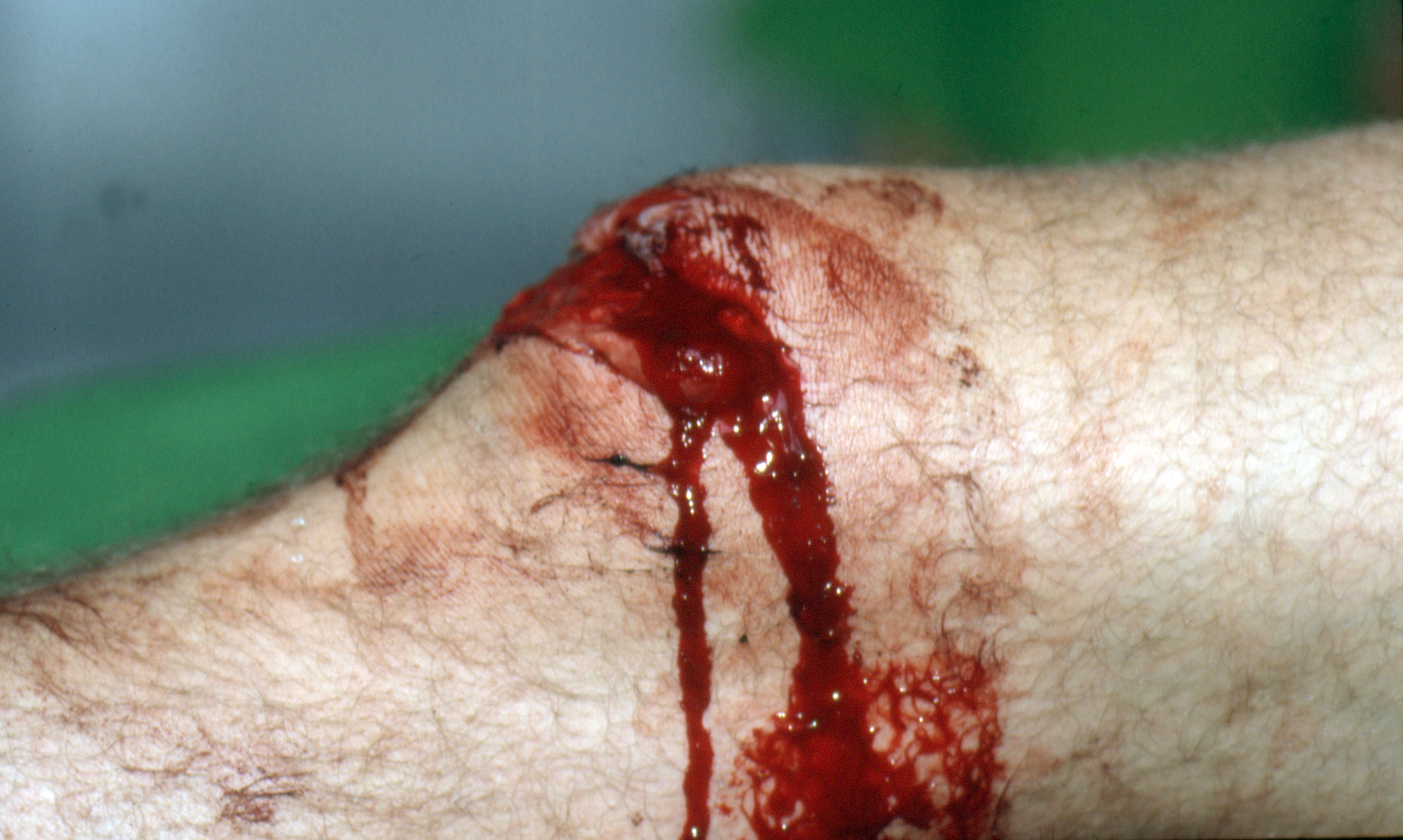 Bild einer offenen Patellafraktur